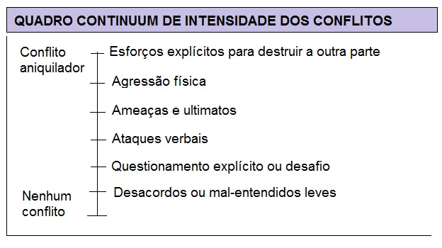 Quadro Contiuum